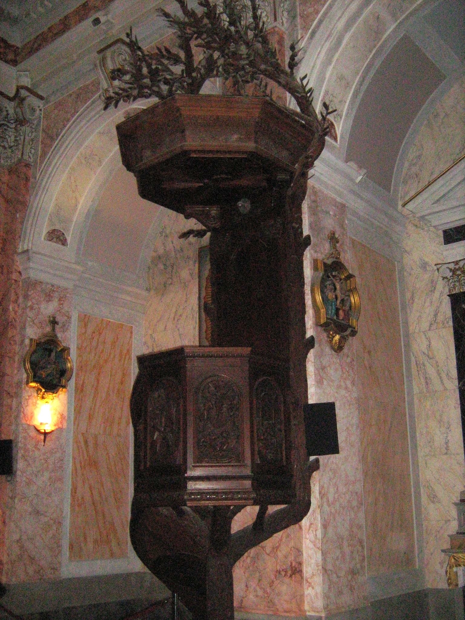 כנסיית פטרוס הקדוש ביפו